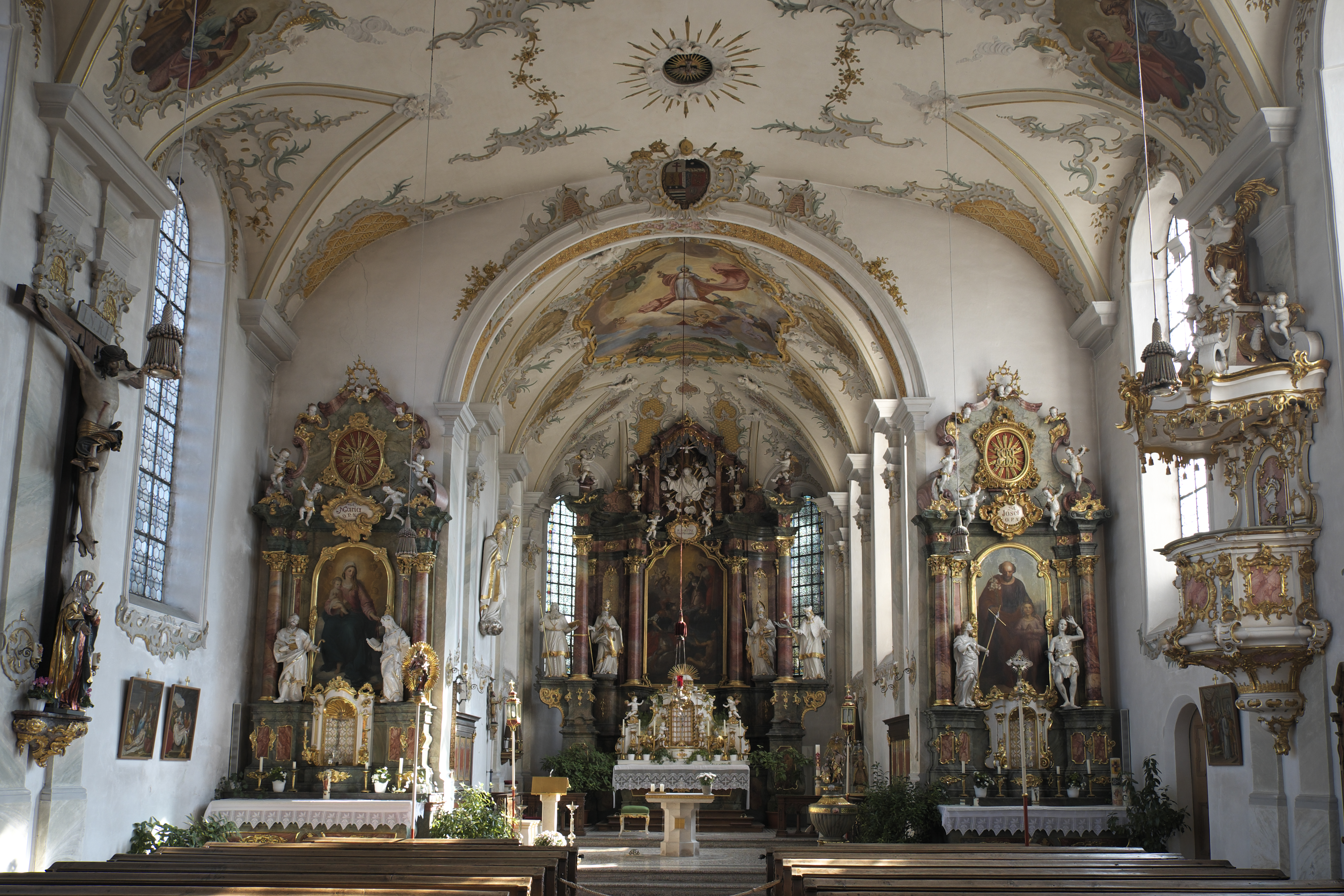 Katholische Pfarrkirche St. Martin in Jengen im Landkreis Ostallgäu (Bayern/Deutschland), Innenraum